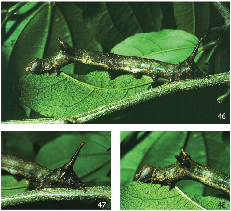 Elymiotis tlotzin